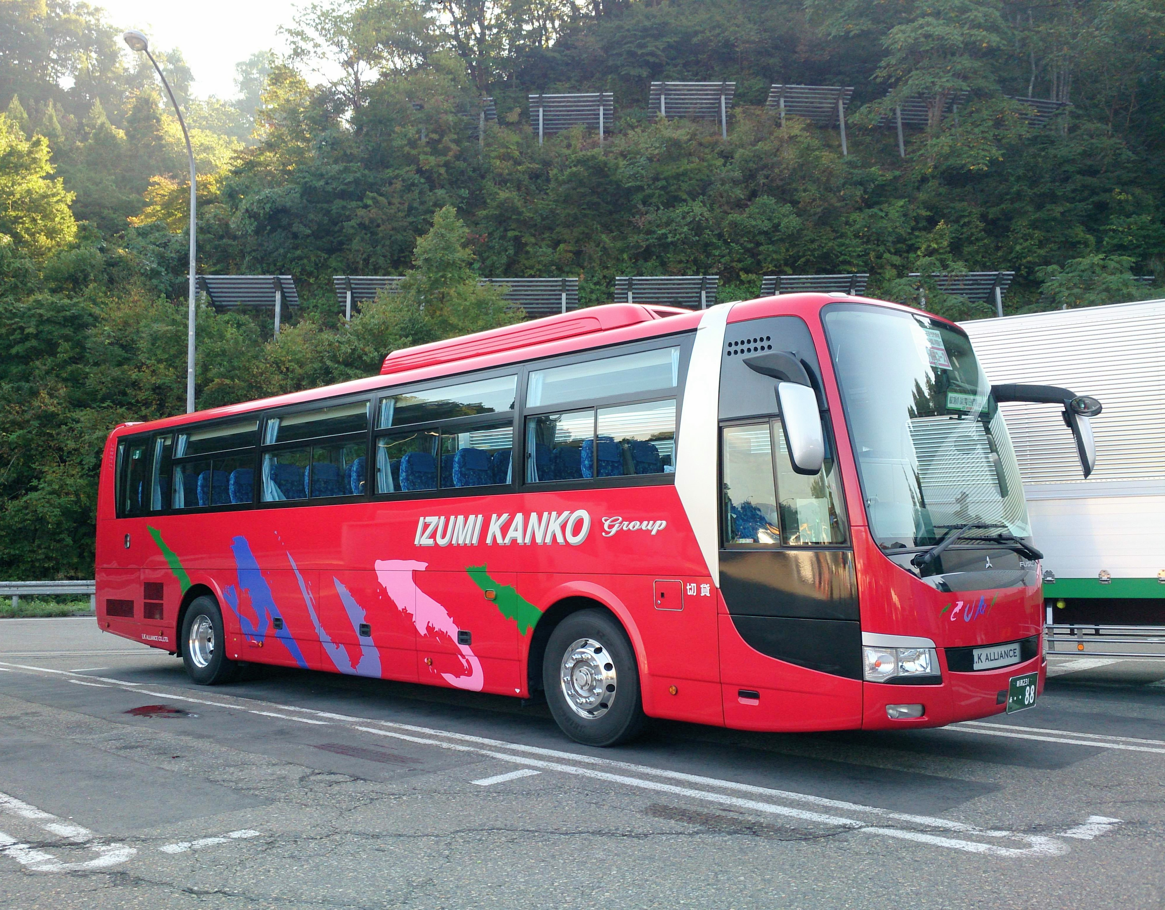 アイケーアライアンスの泉観光バス。ふそうエアロエース